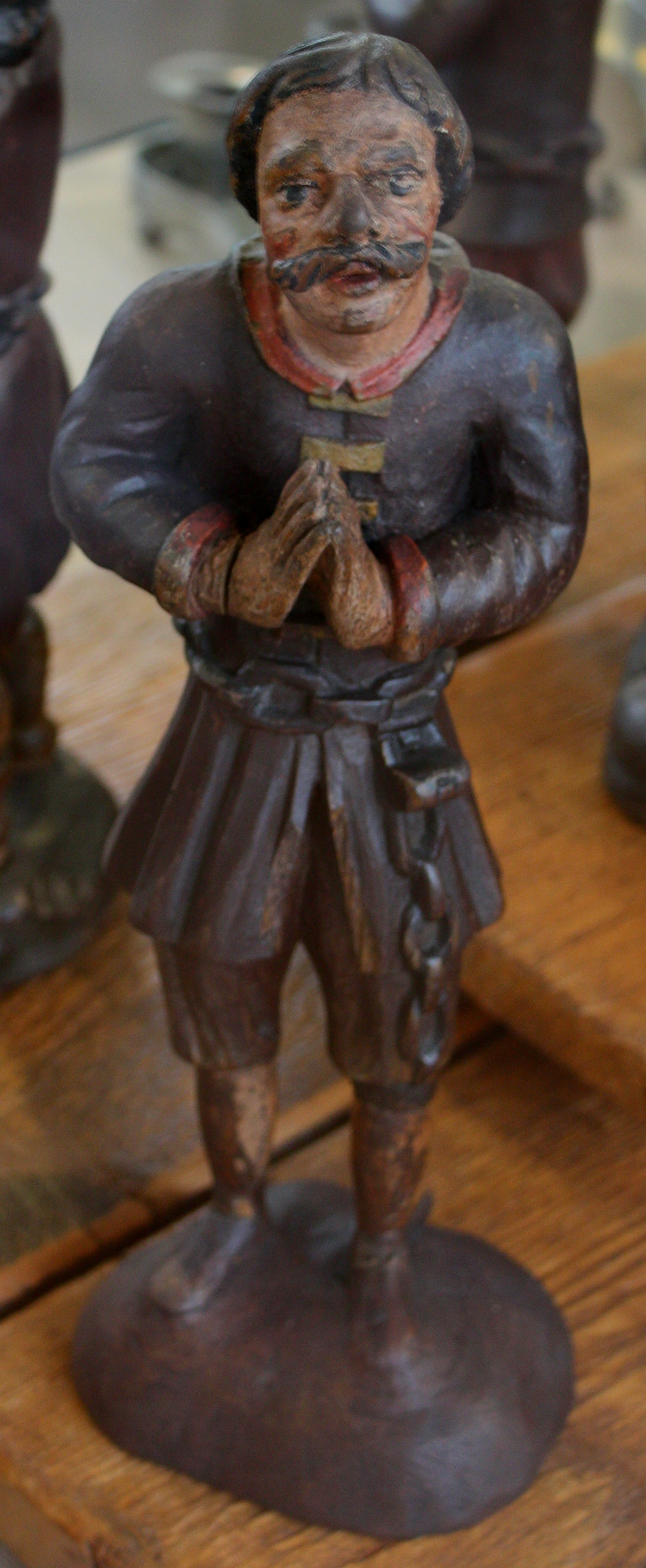 Das Foto zeigt eine sogenannte Sklavenfigur aus der Zeit der Hamburgischen Konvoischiffahrt (17./18. Jahrhundert). Die Figuren sollten zur Spendenbereitschaft der Bürger beitragen und an das Schicksal versklavter Hamburger Seeleute erinnern